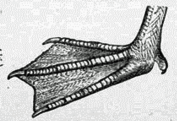 Flamingofuß